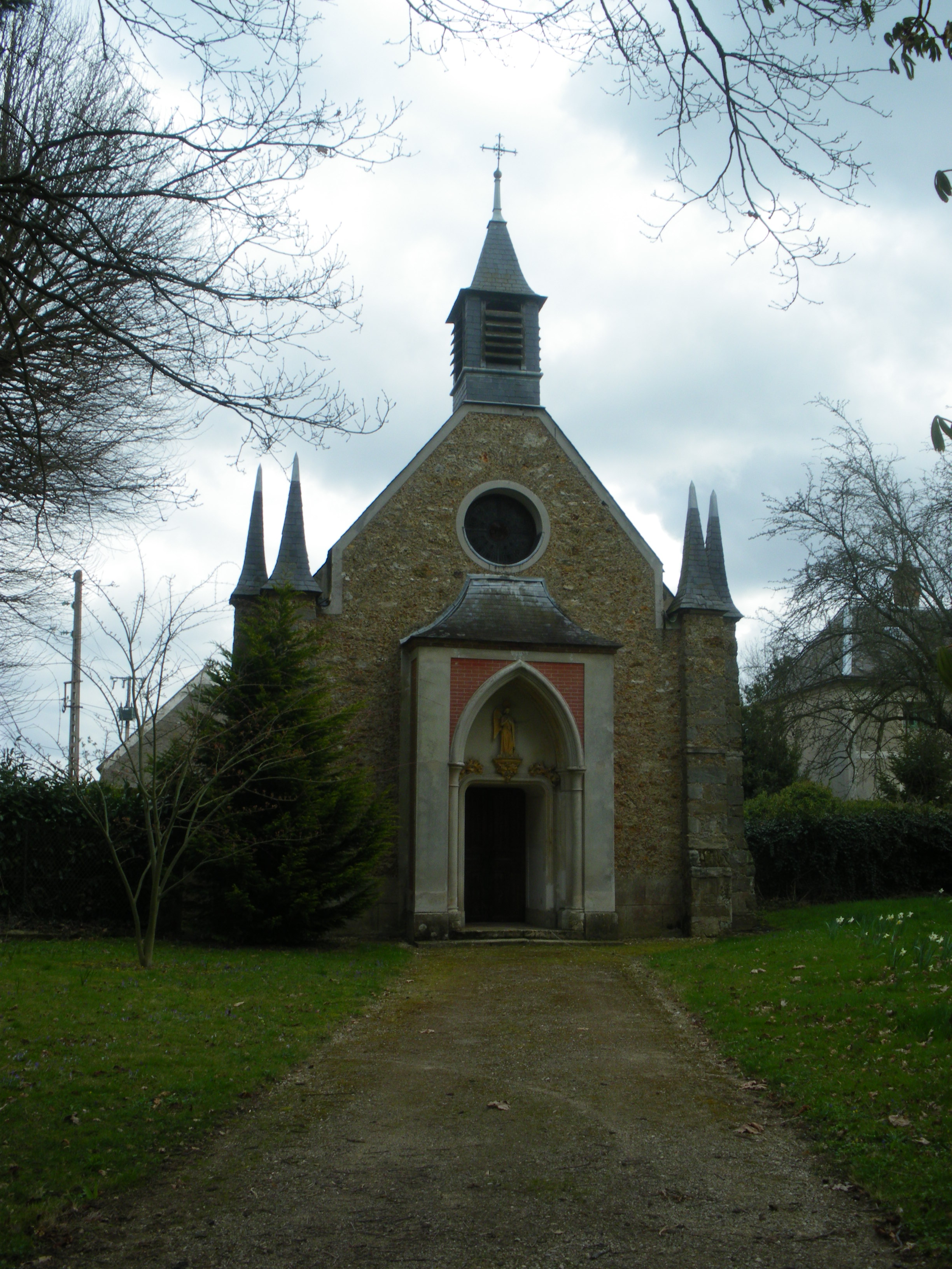 Eglise du Chateau de Saint Jean de Beauregard, Essonne, France